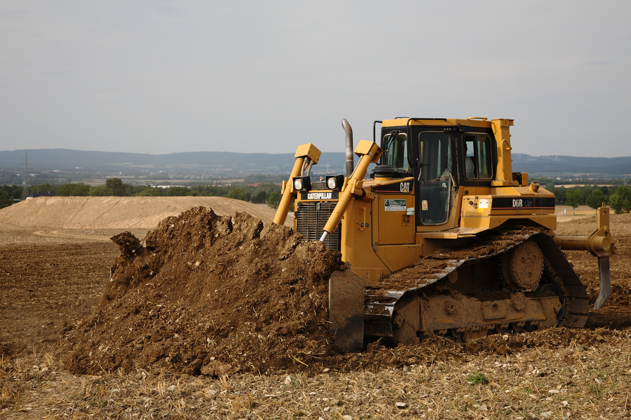 Caterpillar D6R - Planierraupe bei der Arbeit in der Nähe von Paderborn.